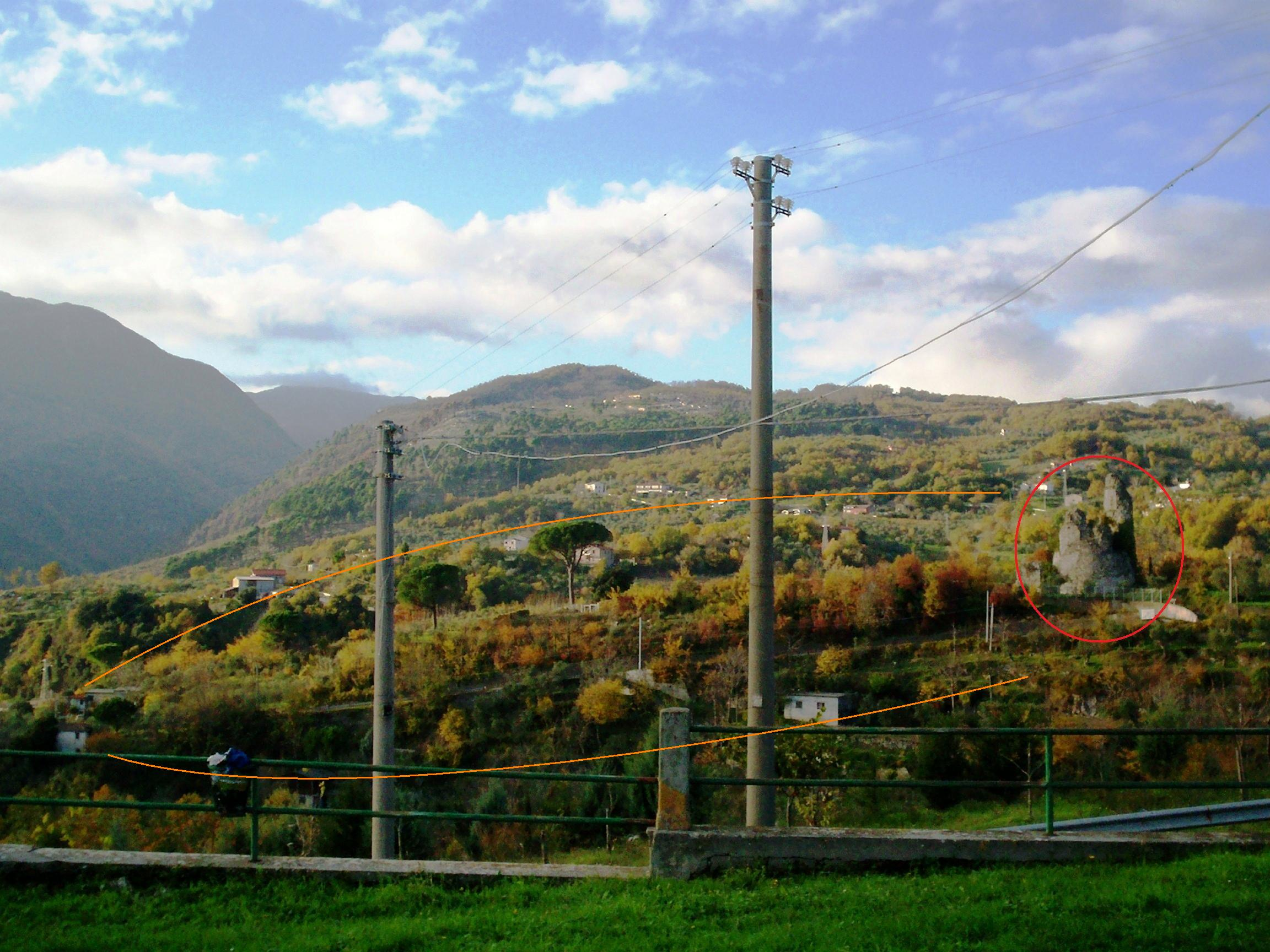 Colle dove sorgeva la vecchia Cerreto Sannita, distrutta dal terremoto del 5 giugno 1688, vista dal Colle del Santuario della Madonna delle Grazie